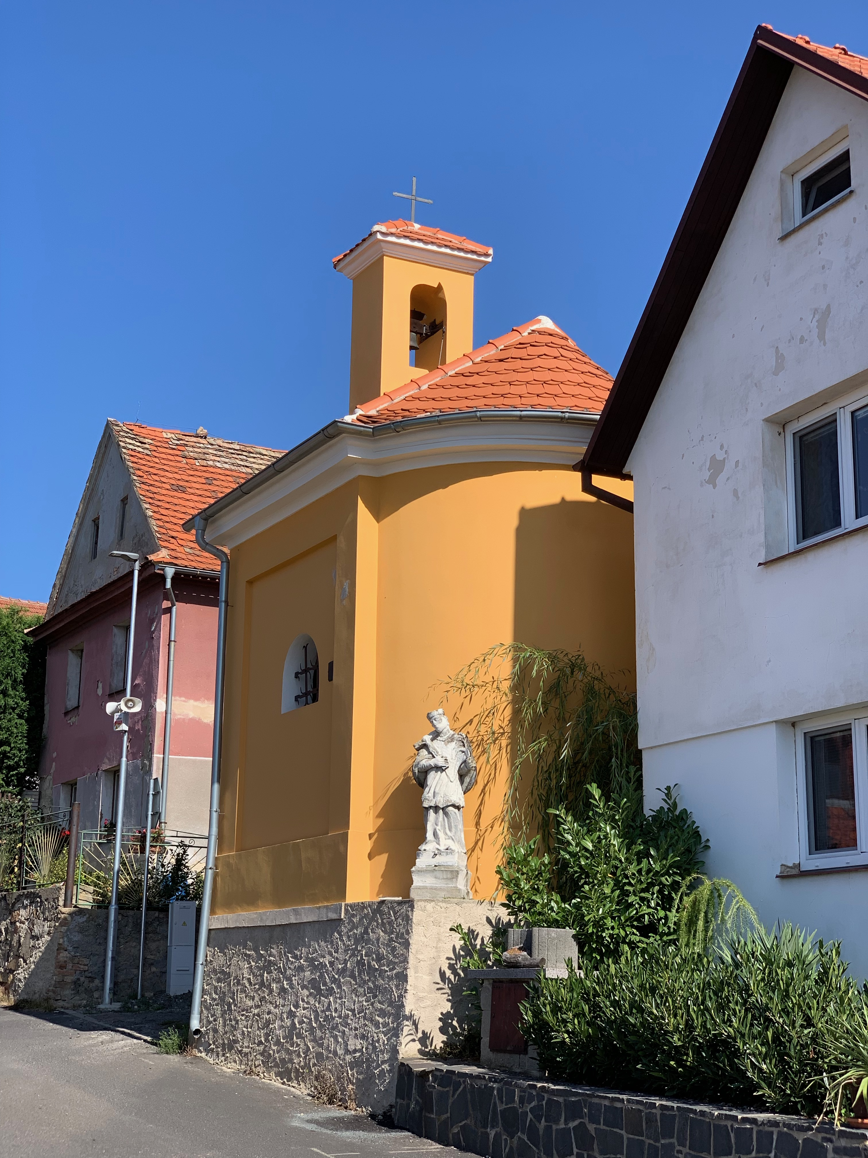 Pozdně empírová kaple sv. Floriána z roku 1842 v Pohořanech (Žitenice)